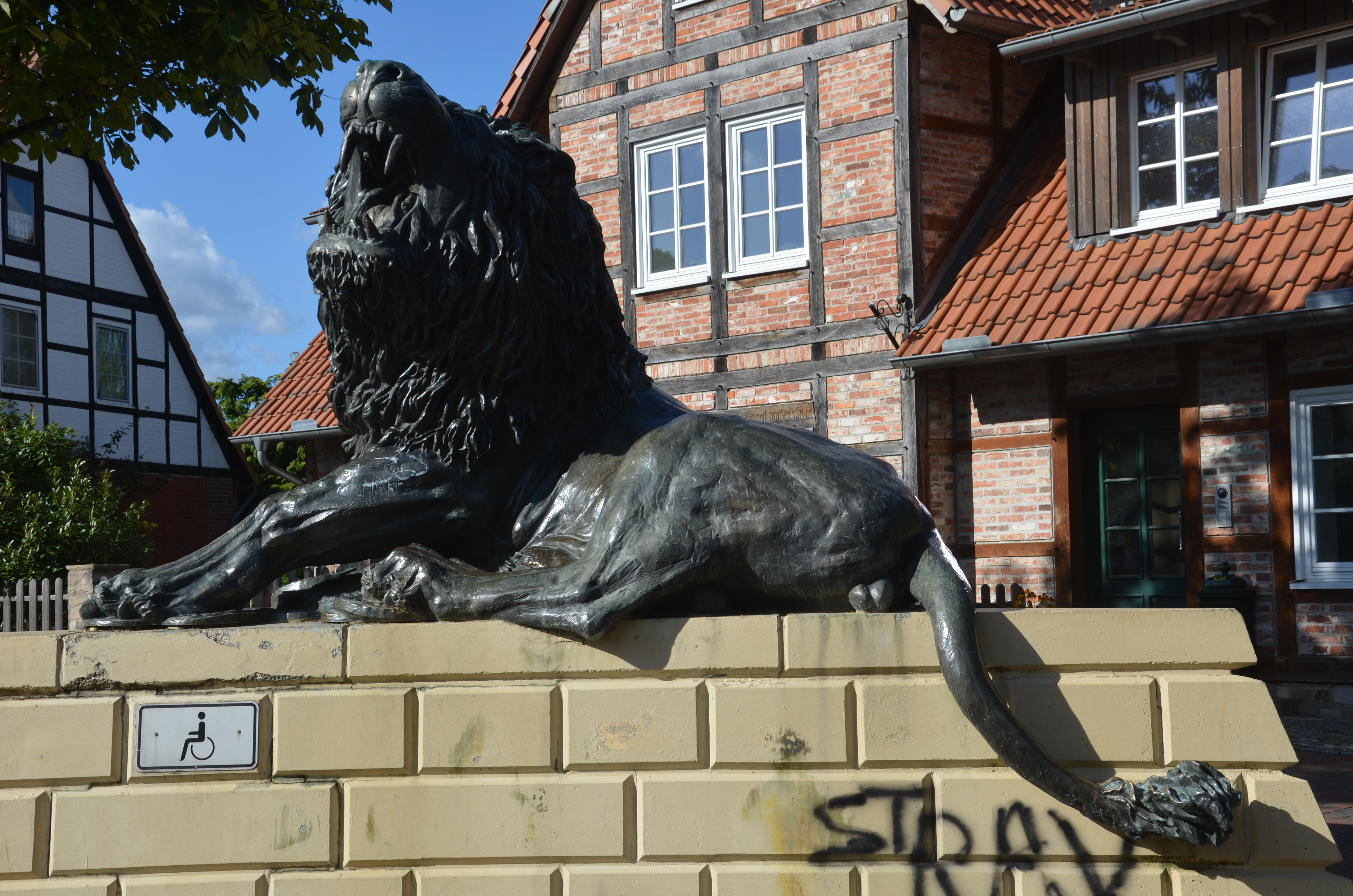 Anlässlich einer Führung durch Schloss Landestrost für dem Freundeskreis Hannover und einem Besuch der Sektkellerei Duprès enstand im Vorfeld durch ehrenamtliche MItarbeiter vom Wikipedia-Büro Hannover diese Detail-Aufnahme vom Löwen zwischen Brücken in Neustadt am Rübenberge ...